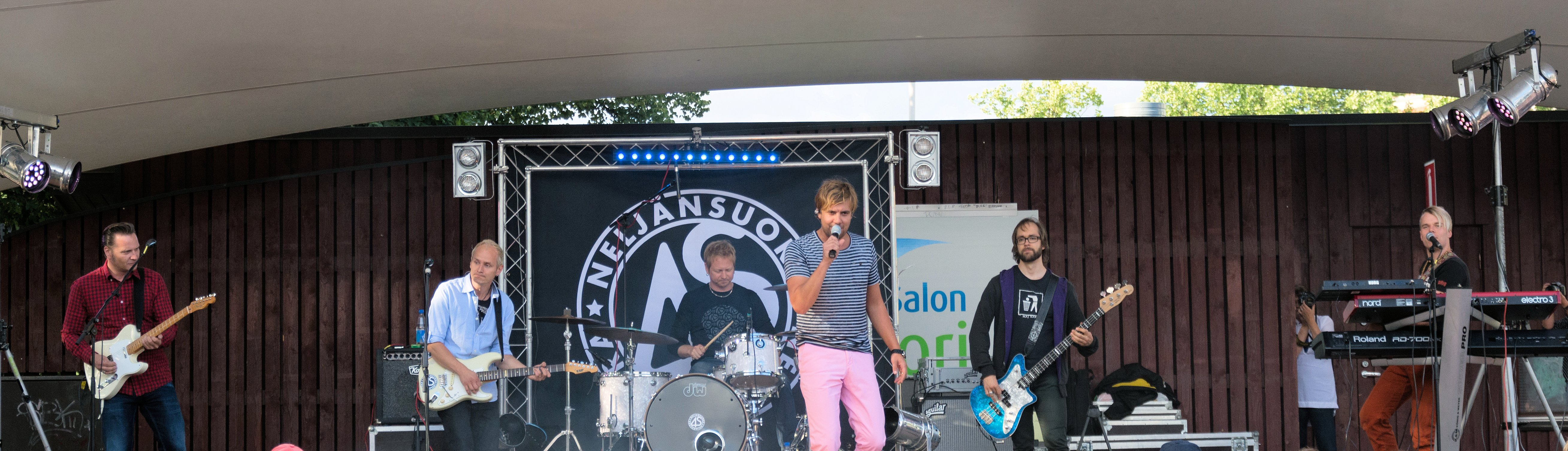 Neljänsuora suomalainen yhtye